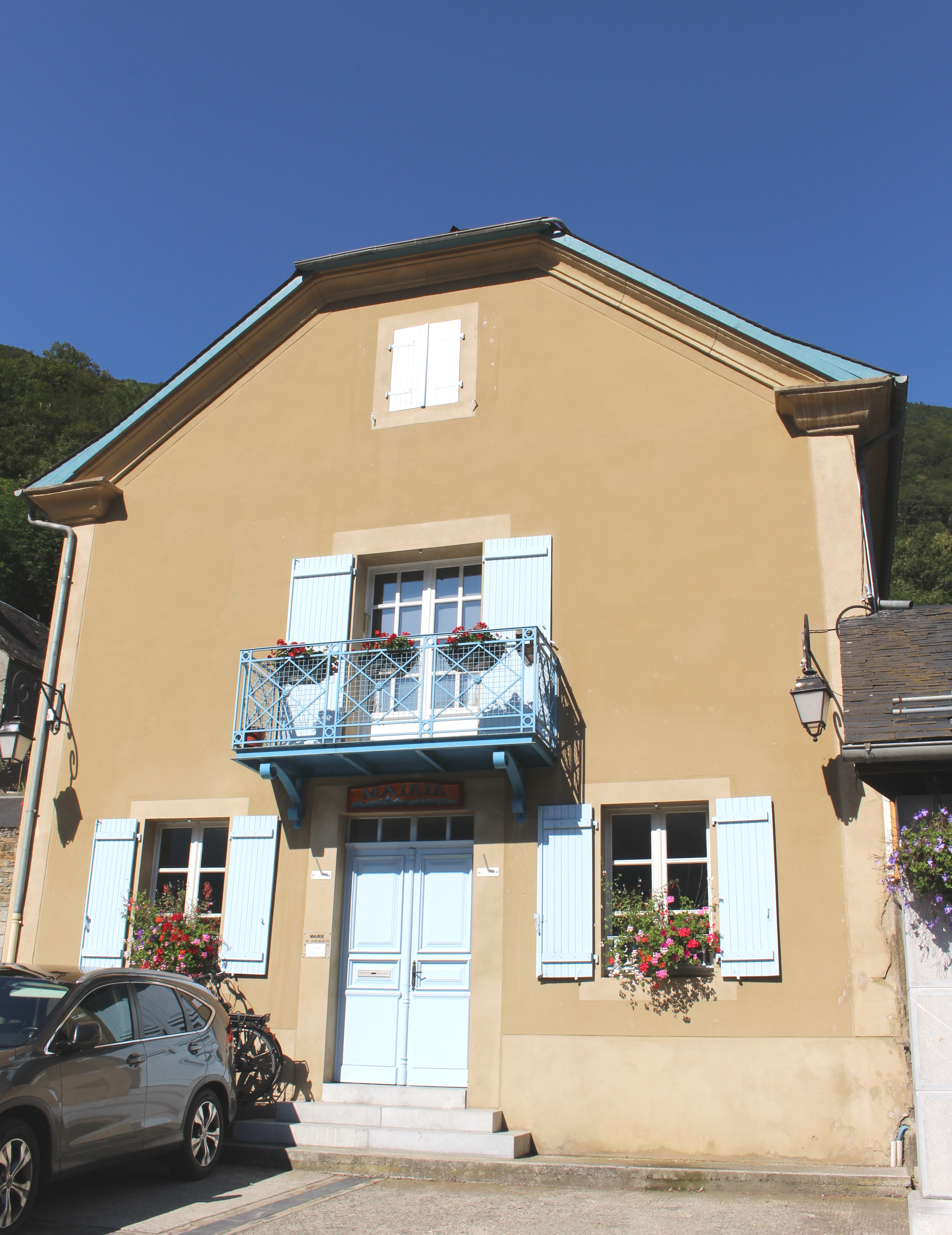 Mairie de Viscos (Hautes-Pyrénées)